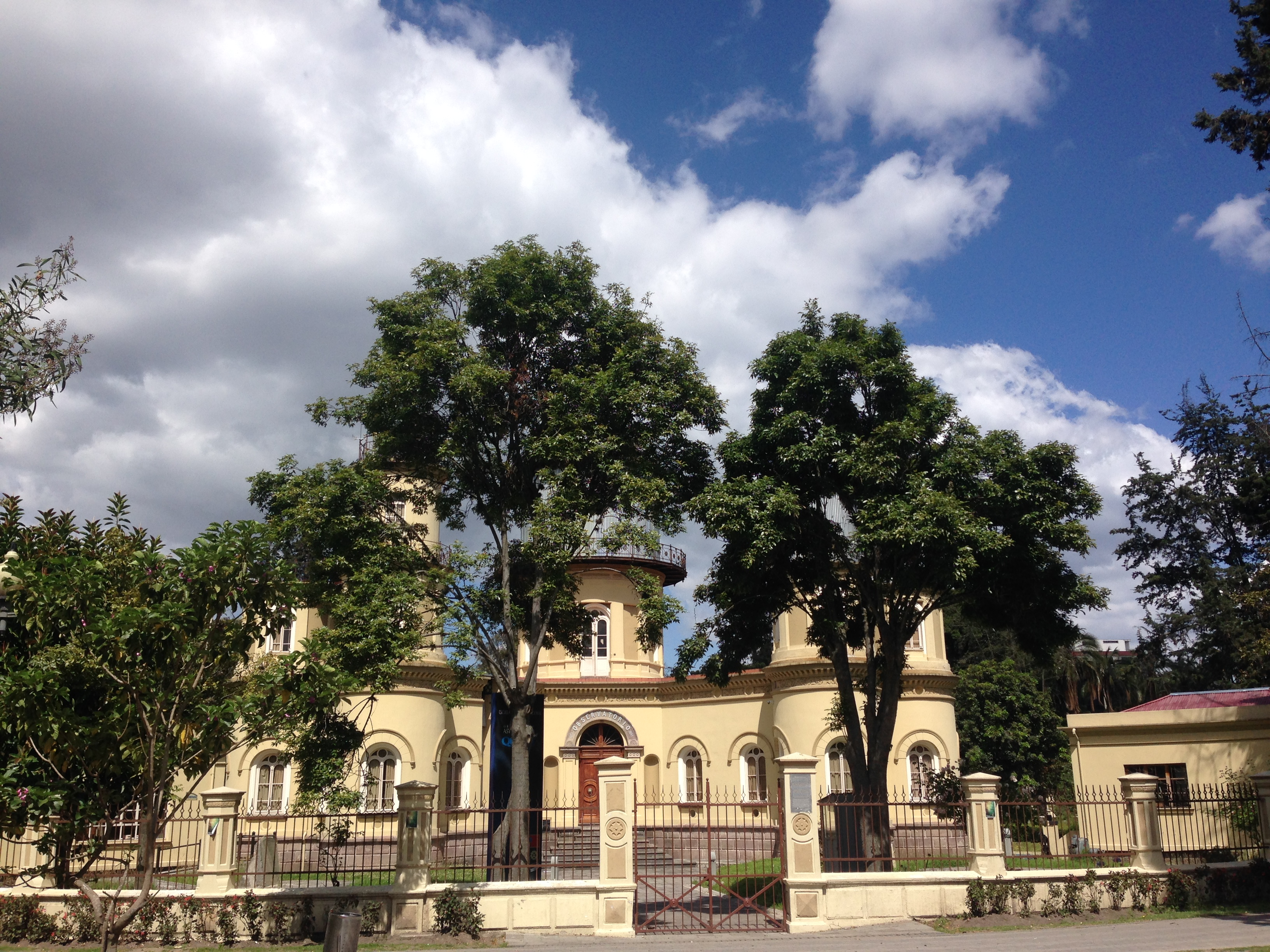 El Observatorio Astronómico fue construido por el Presidente García Moreno, siendo uno de los más avanzados de la época.